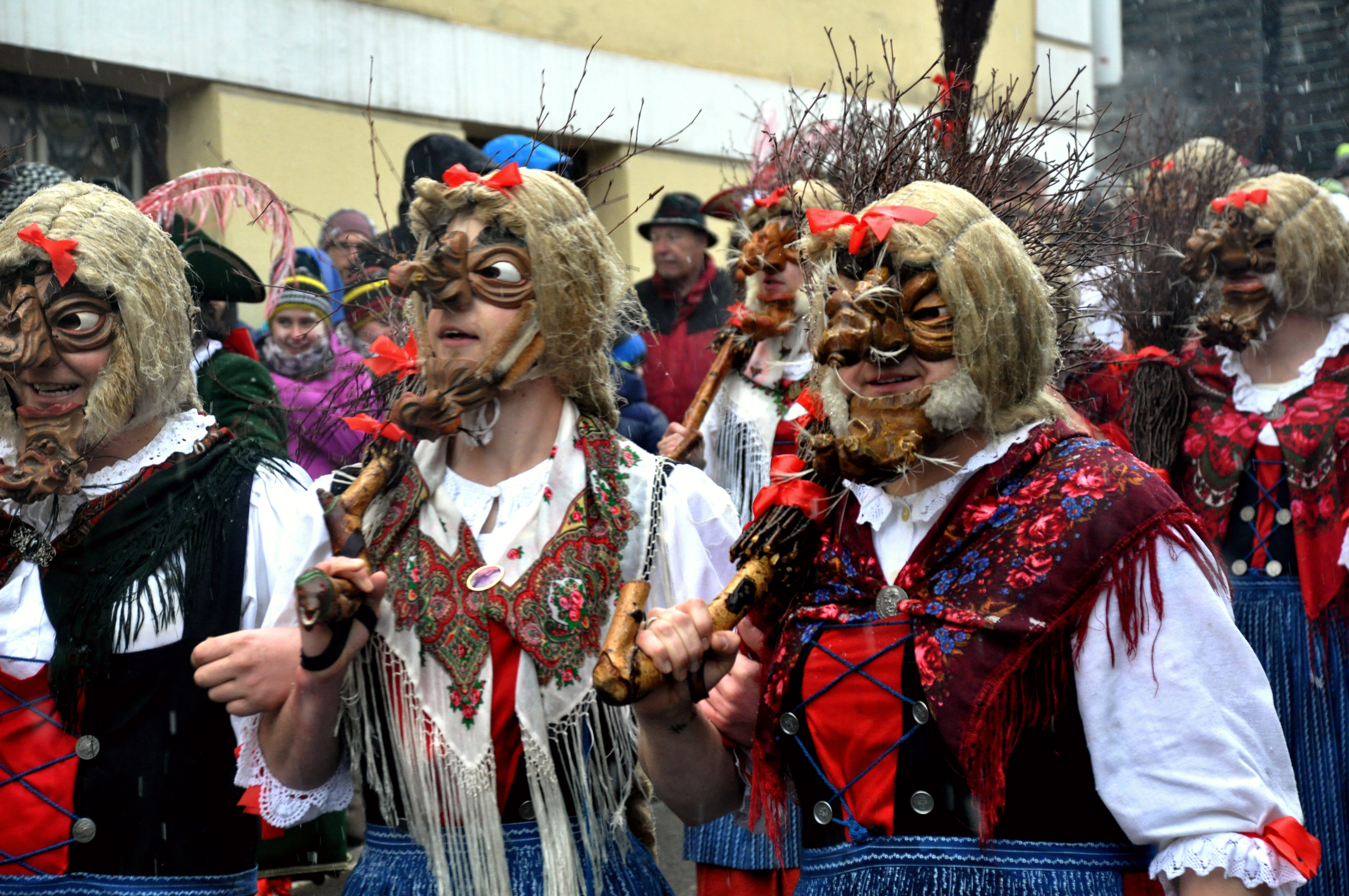 Imst (Tirol), Imster Schemenlaufen 2016, Hexen